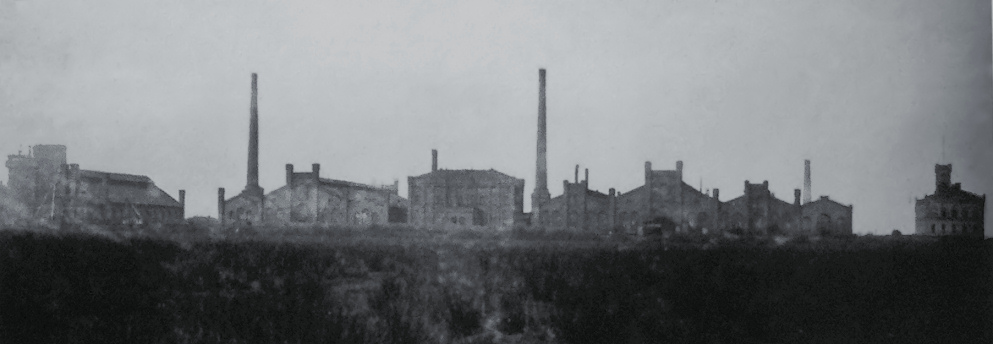 Eisenhütte Neustadt um 1870